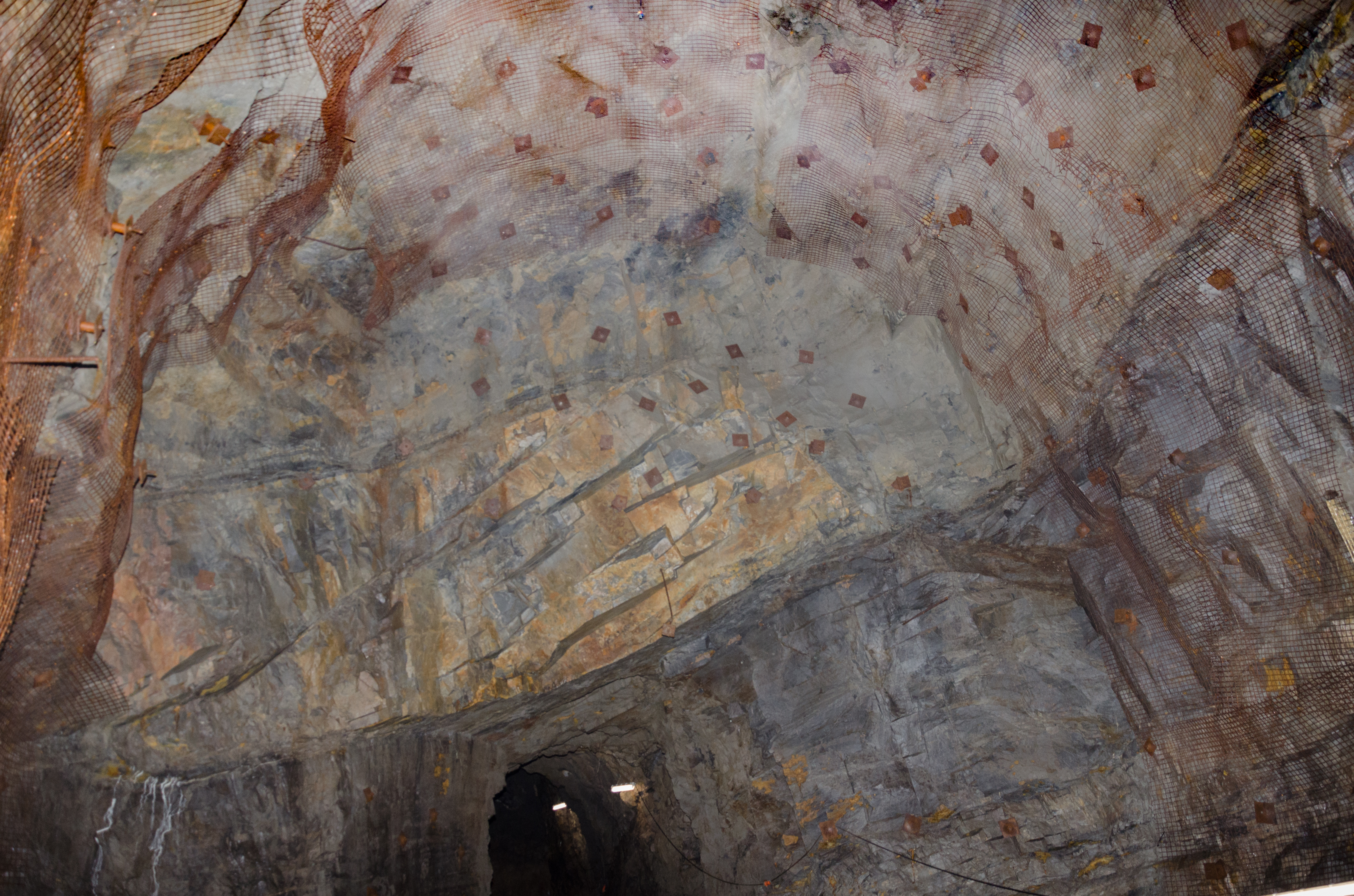 Kaverne im Hardtstollen (Wuppertal)